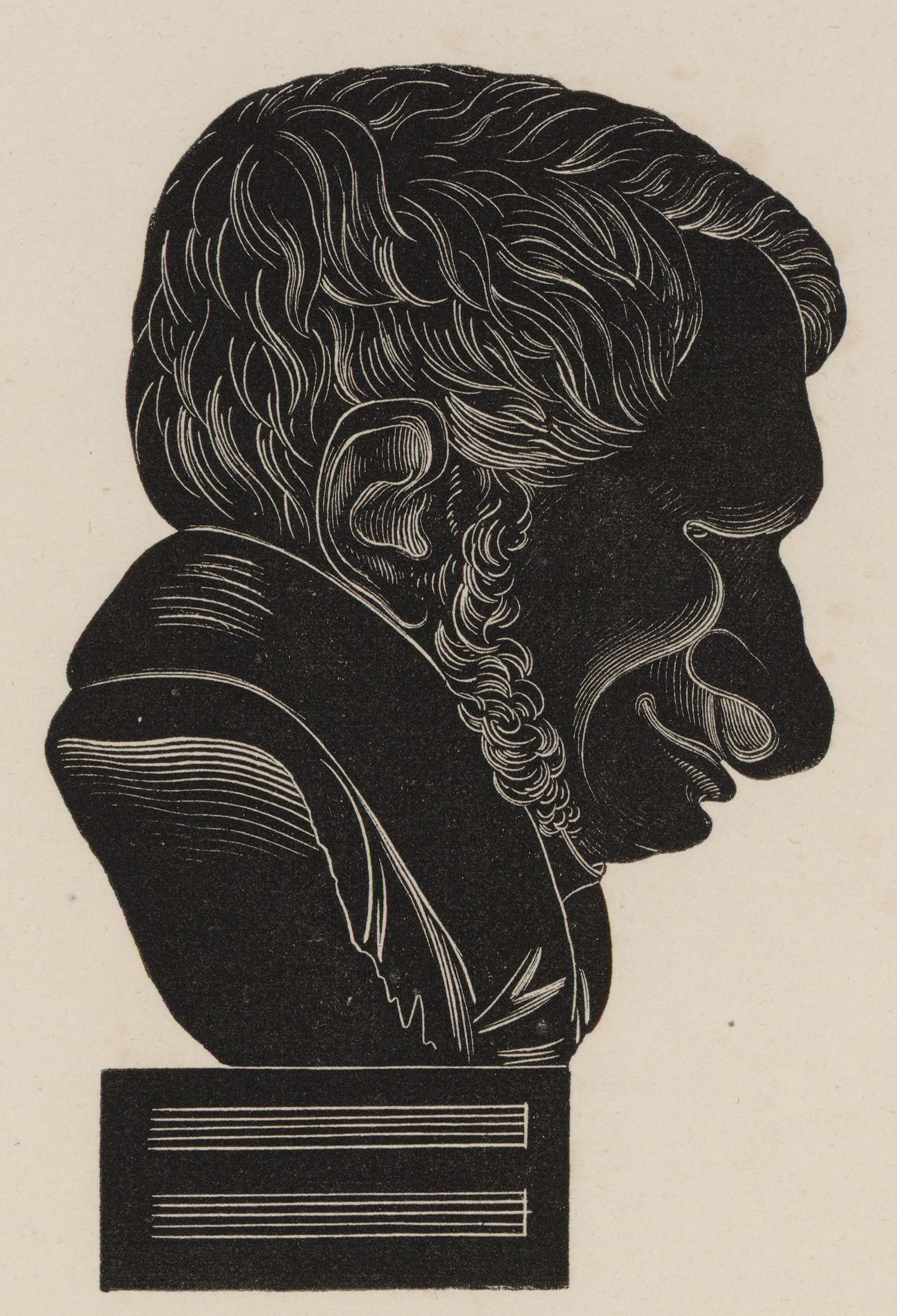 Casimir Gide / D'après le buste-charge de Jean-Pierre Dantan